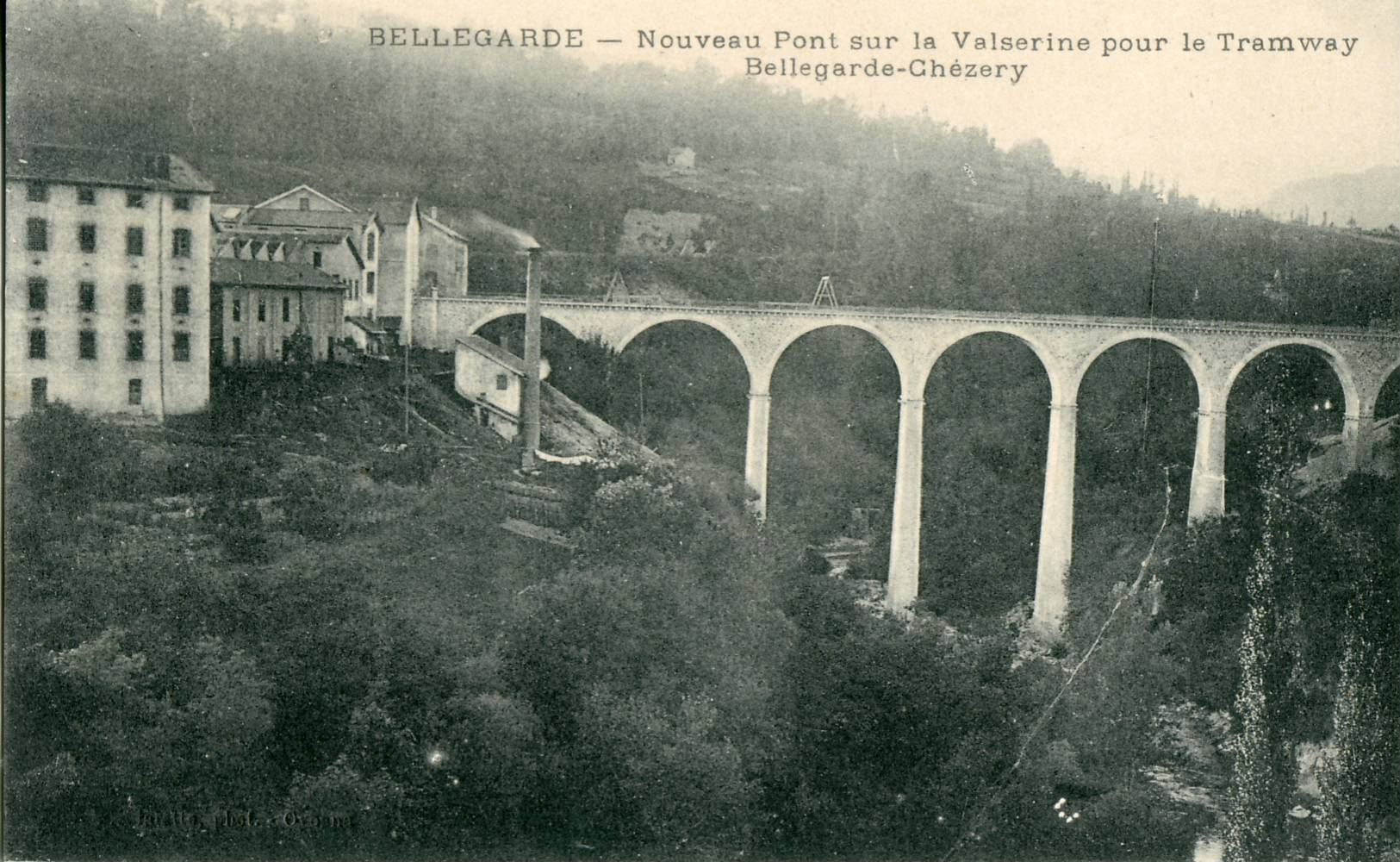 Carte postale ancienne éditée par B & G à Lyon BELLEGARDE - Nouveau pont sur la Valserine pour le Tramway de Bellegarde à Chézery Le pont est encore en chantier. Le cliché date donc d'avant la mise en service de la ligne, en 1912